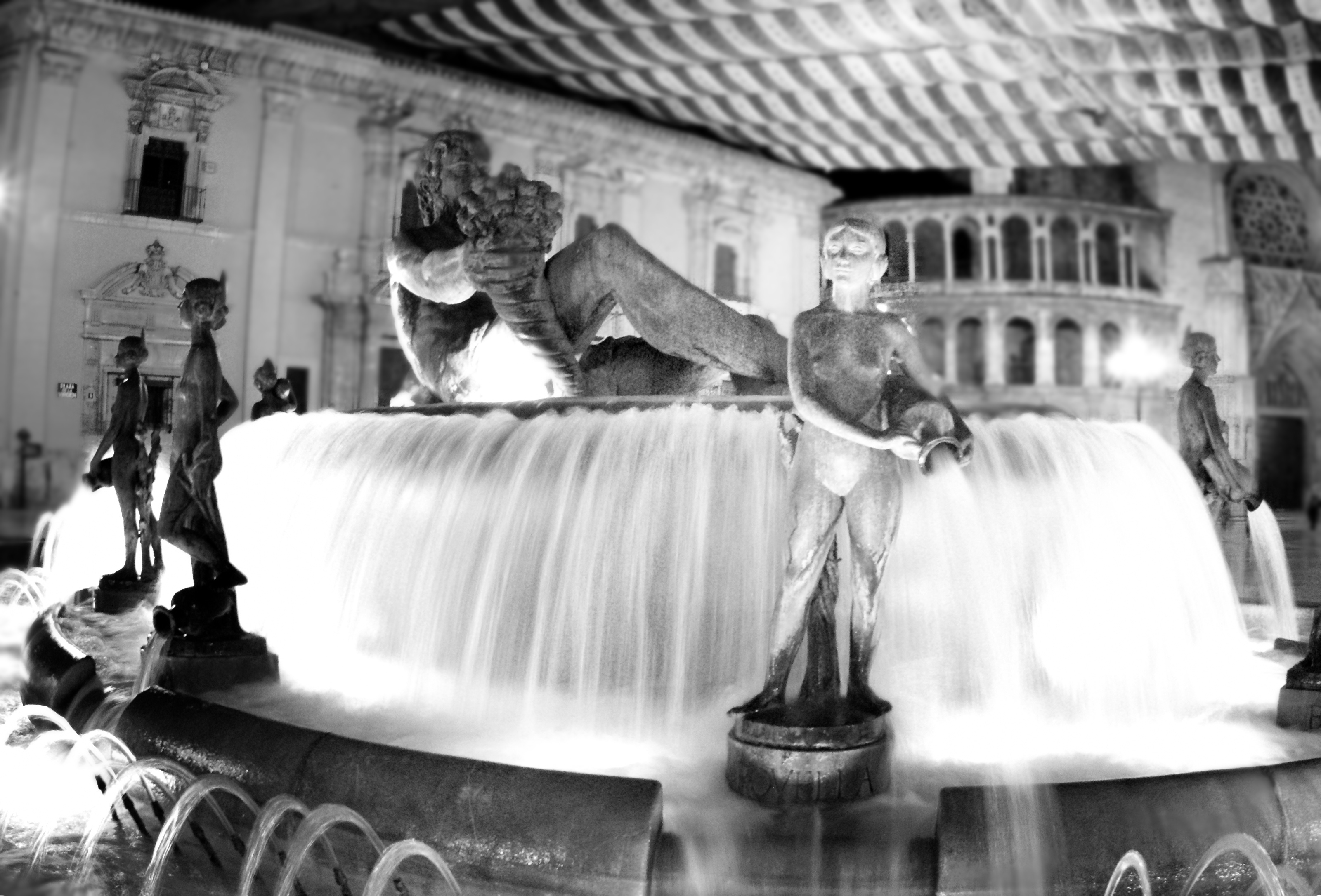 Imagen de la fuente de la plaza de la Virgen. Valencia. España